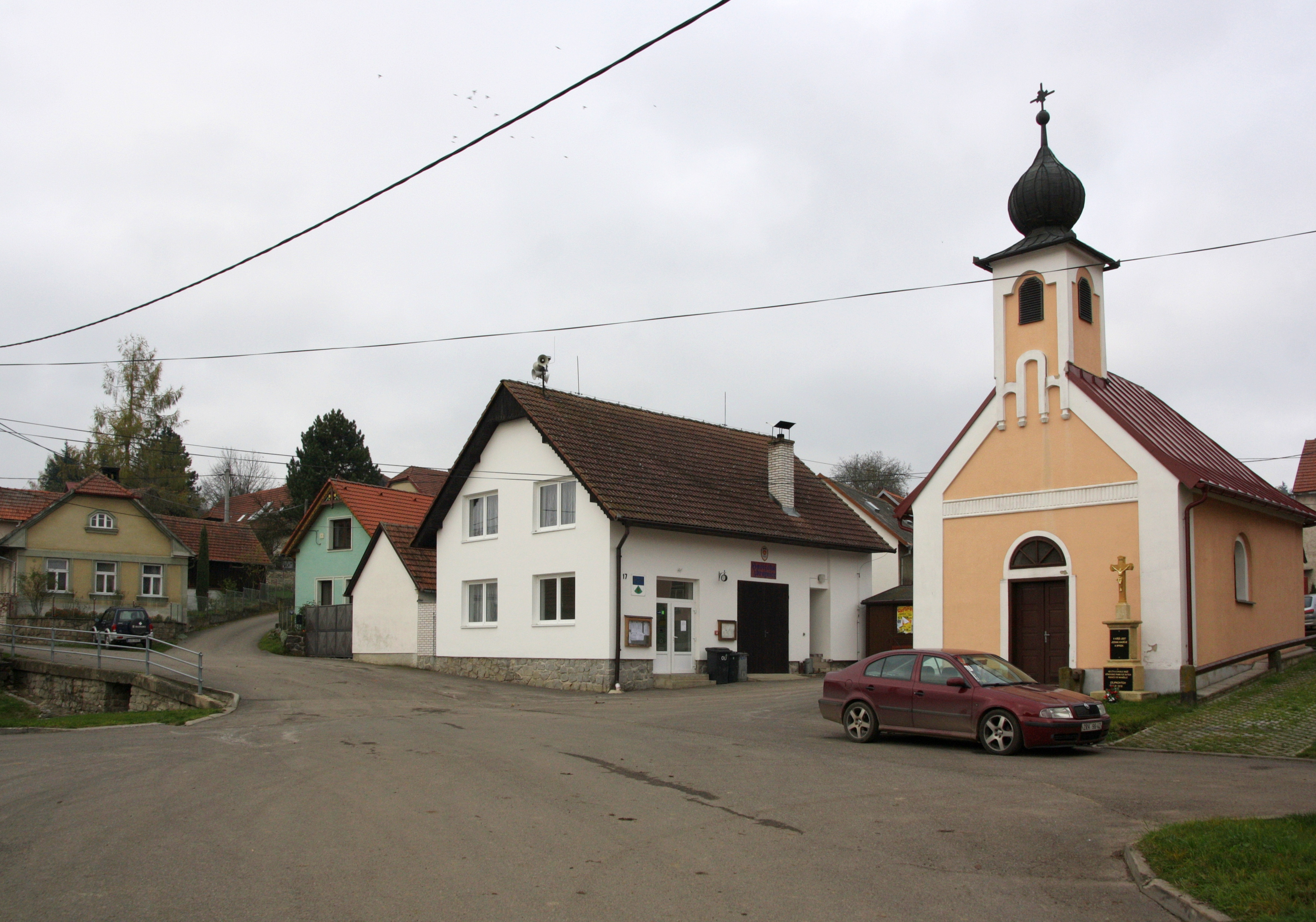 Dědkov (Blízkov) - náves